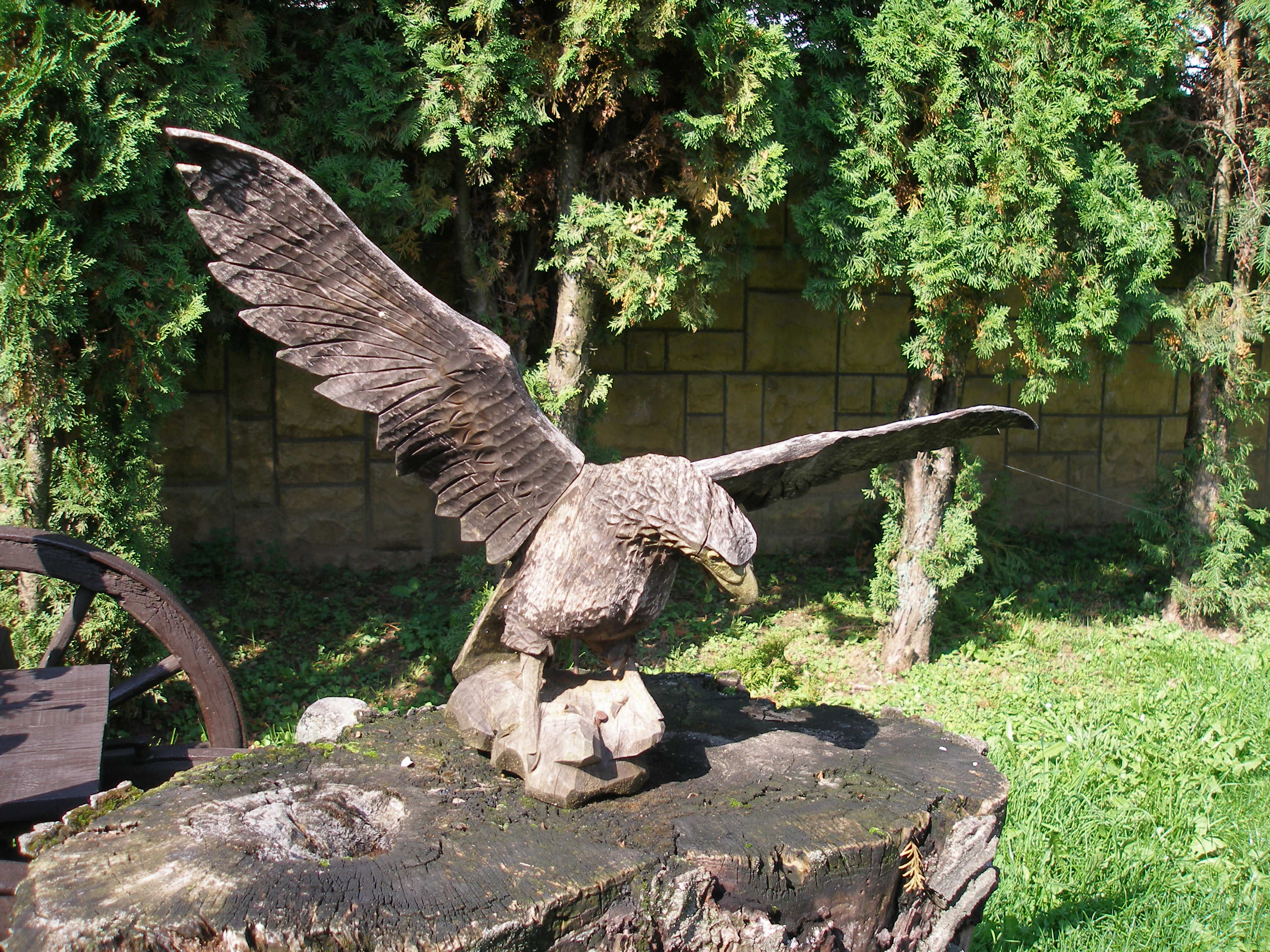 Motel Jami Kračúnovce, obec Kračúnovce, okres Svidník.